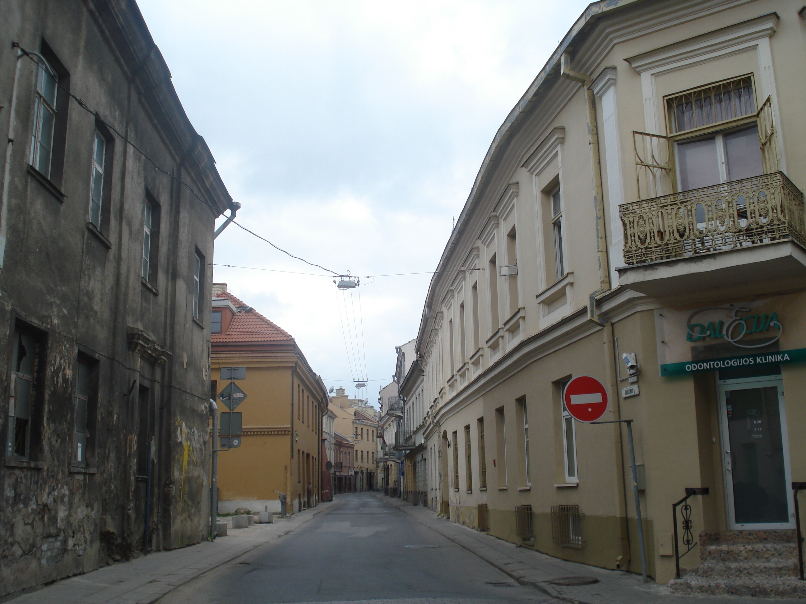 Savičiaus gatvė (ulica Sawicz) in Vilnius